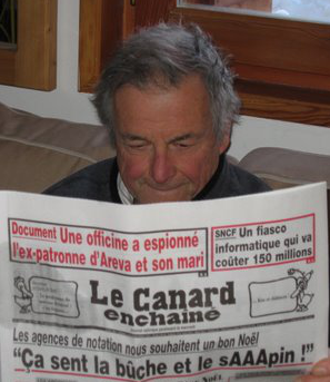 Un lecteur du "Canard enchaîné" du 21 décembre 2011 (image rognée depuis l'original)